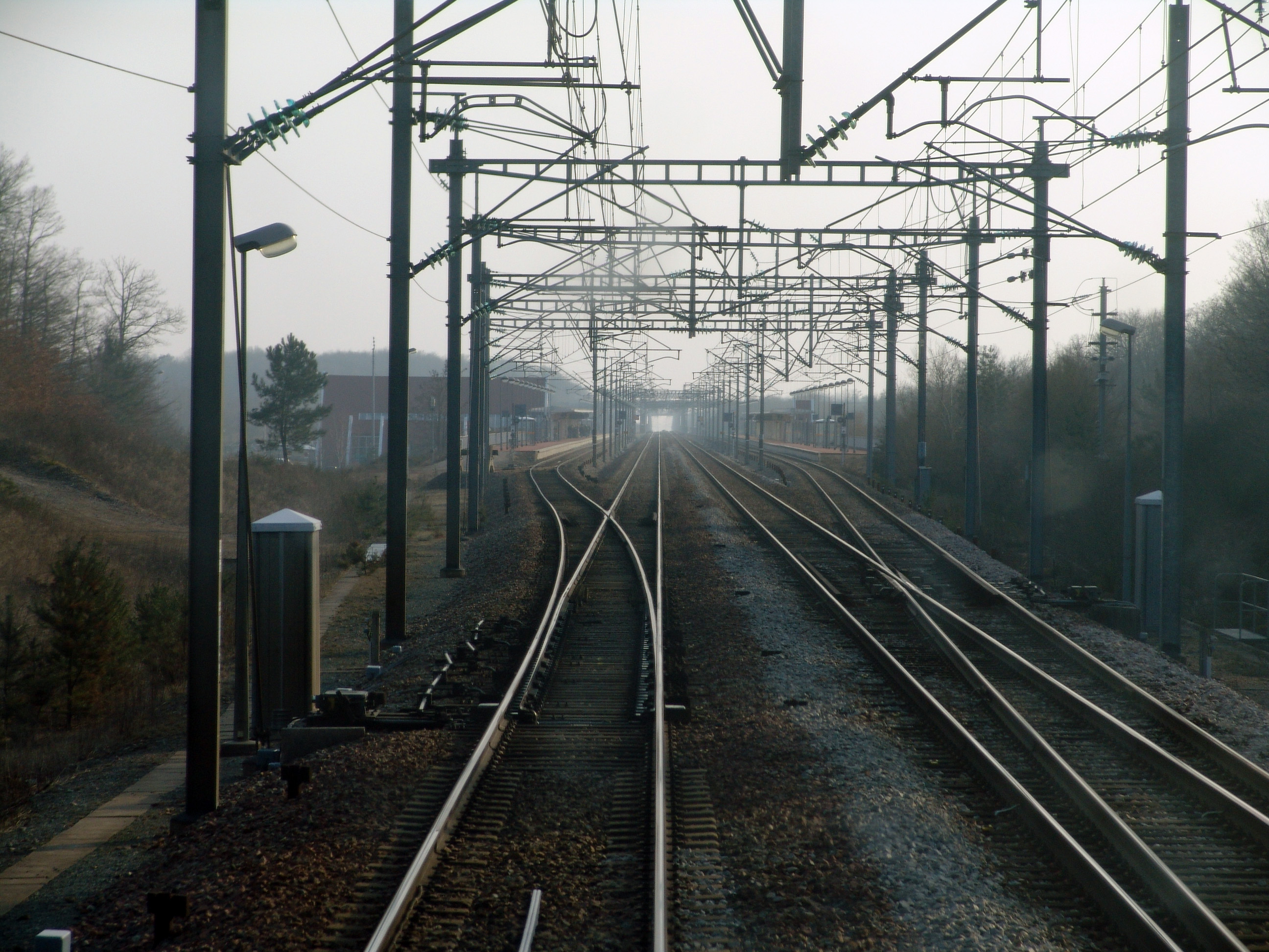 Entrée nord de la gare Vendôme - Villiers-sur-Loir TGV vue depuis la cabine de conduite du TGV Atlantique 363 (motrice 2).